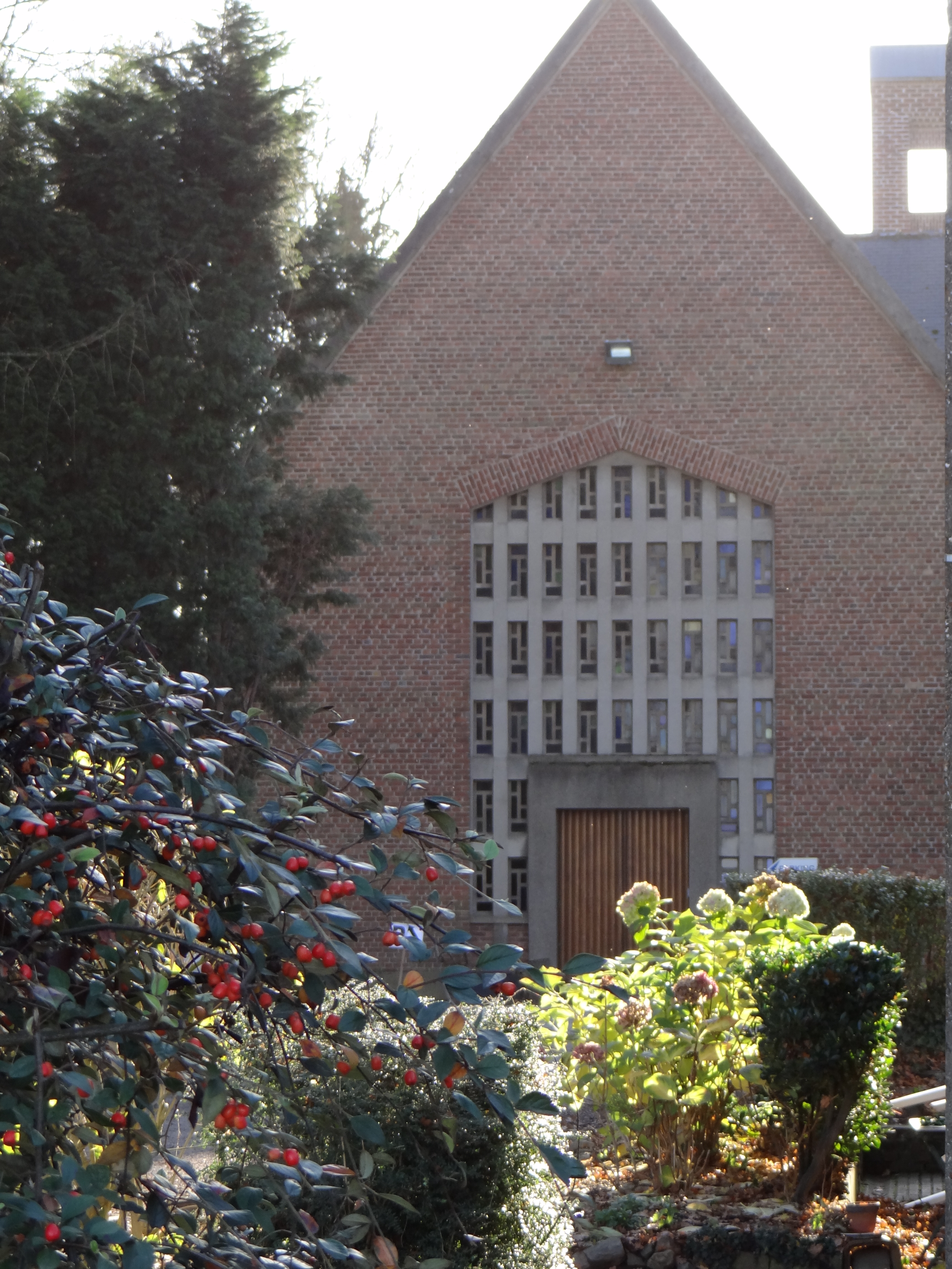 Bouvines Monatère